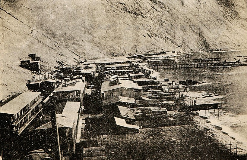 Caleta Buena, Chile.